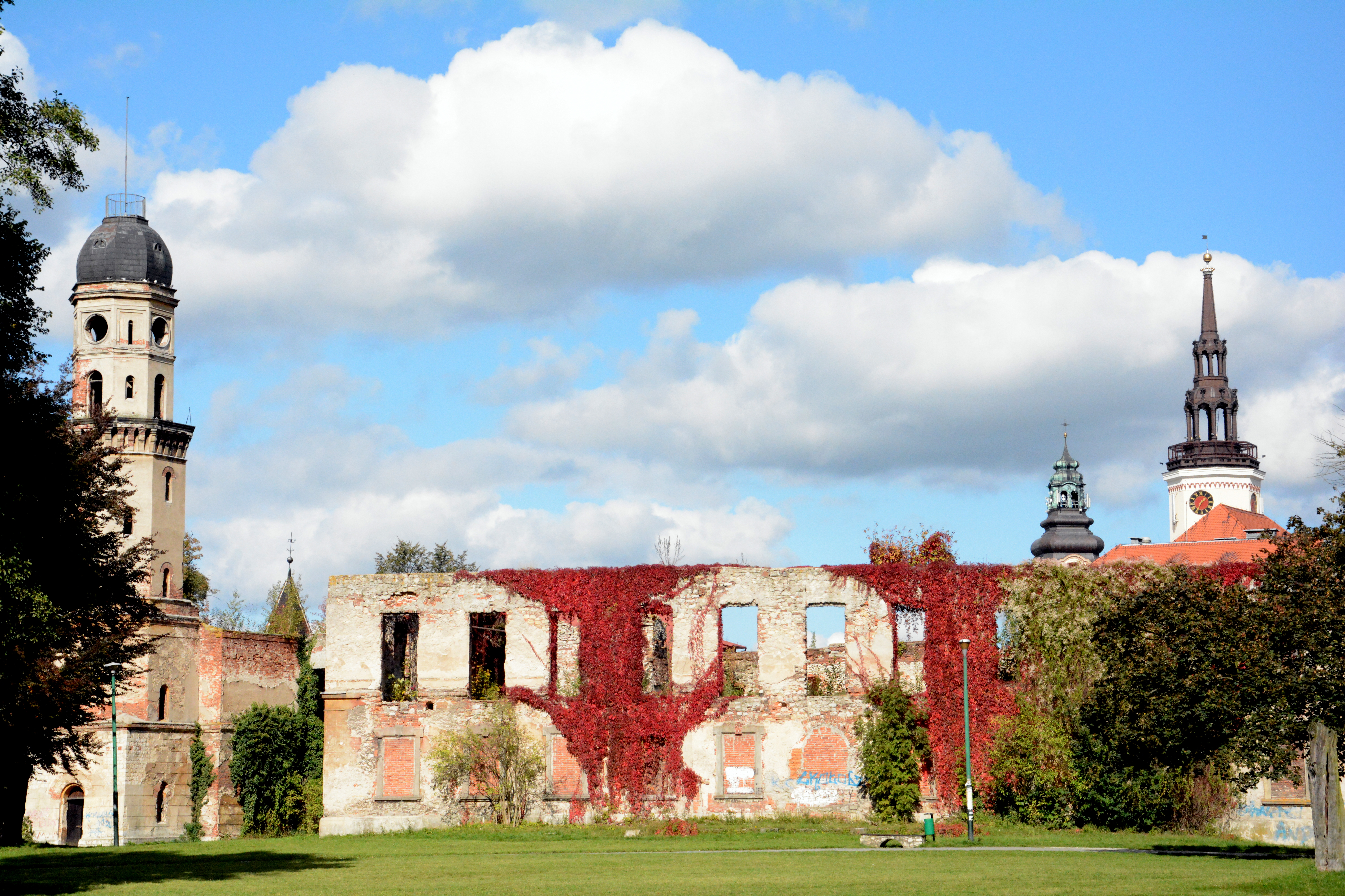 Strzelce Opolskie, zamek (ruina), XIV, 1562-1592, XVIII, XIX